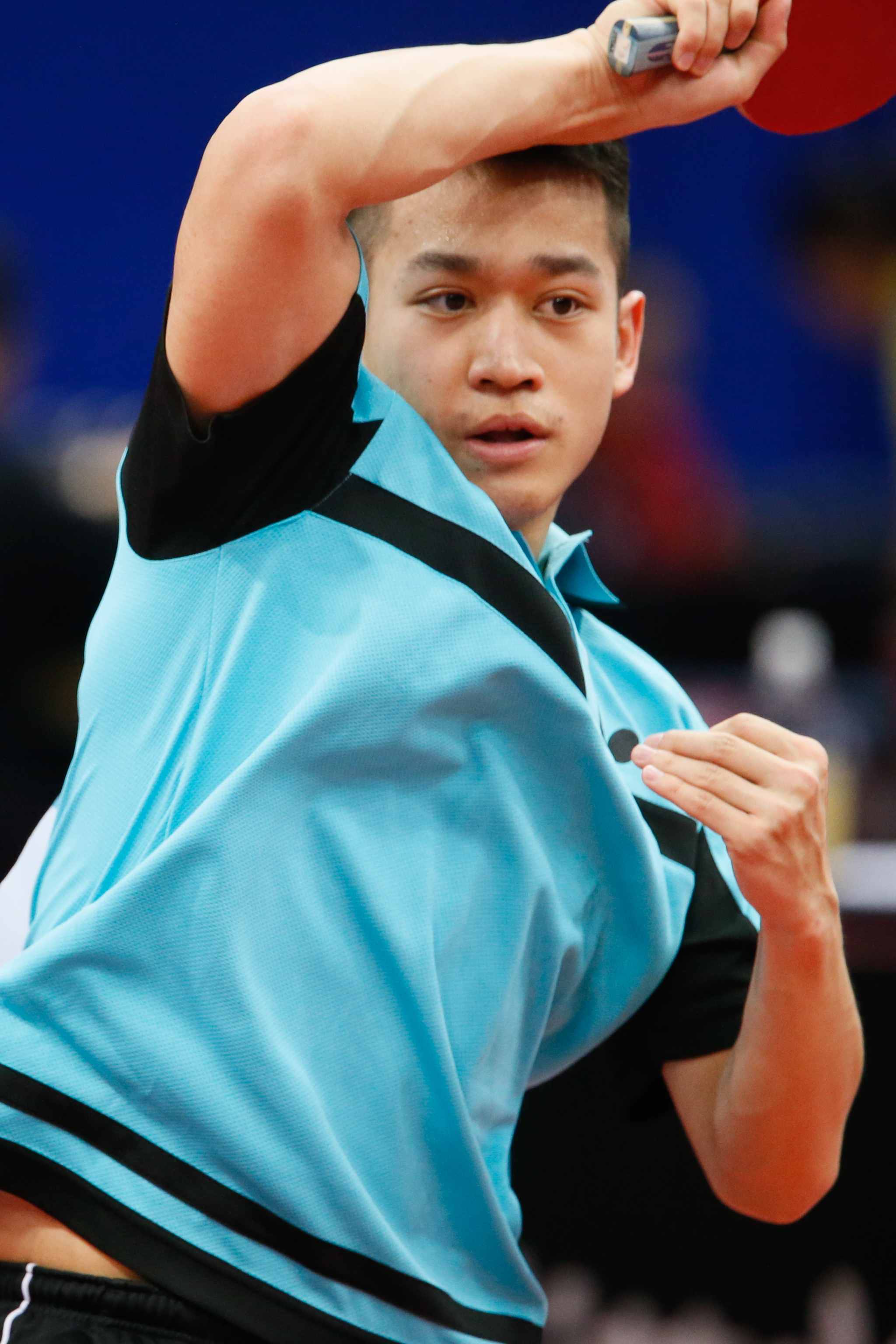 _K0K8998